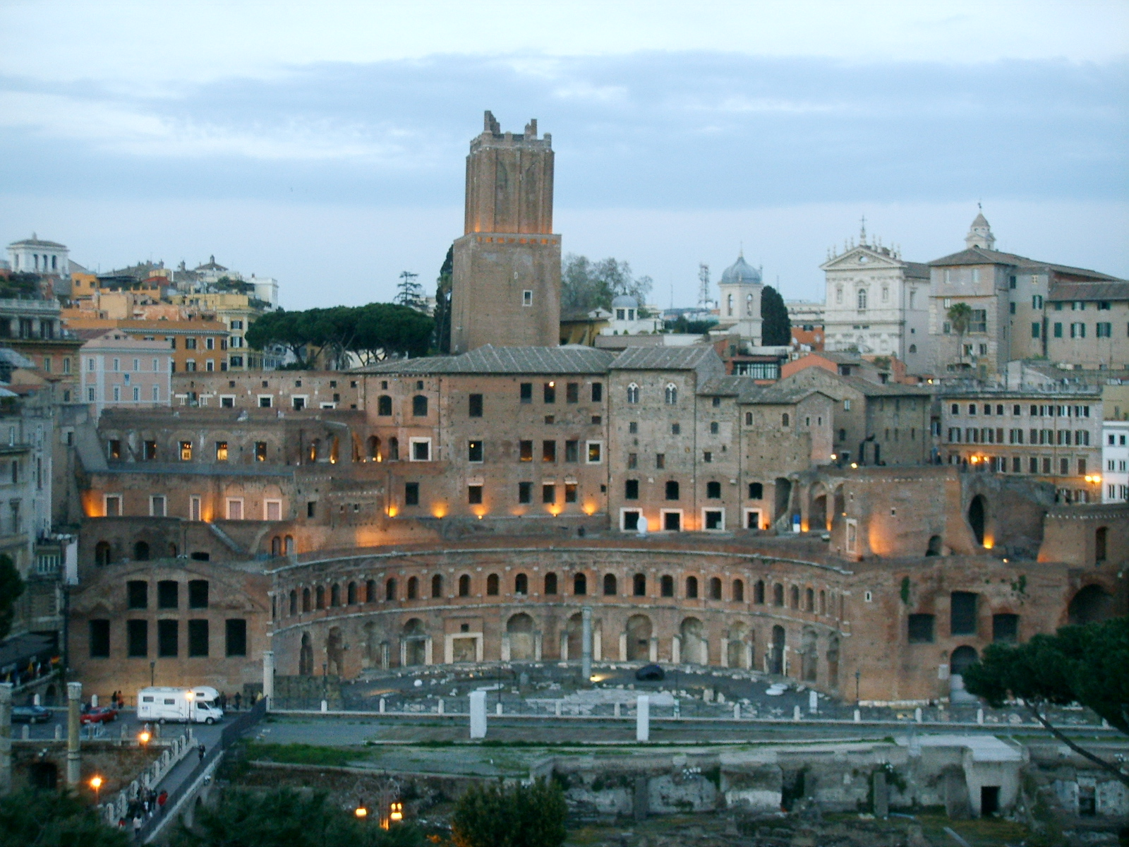 Roma, vista 03 mercati di traiano